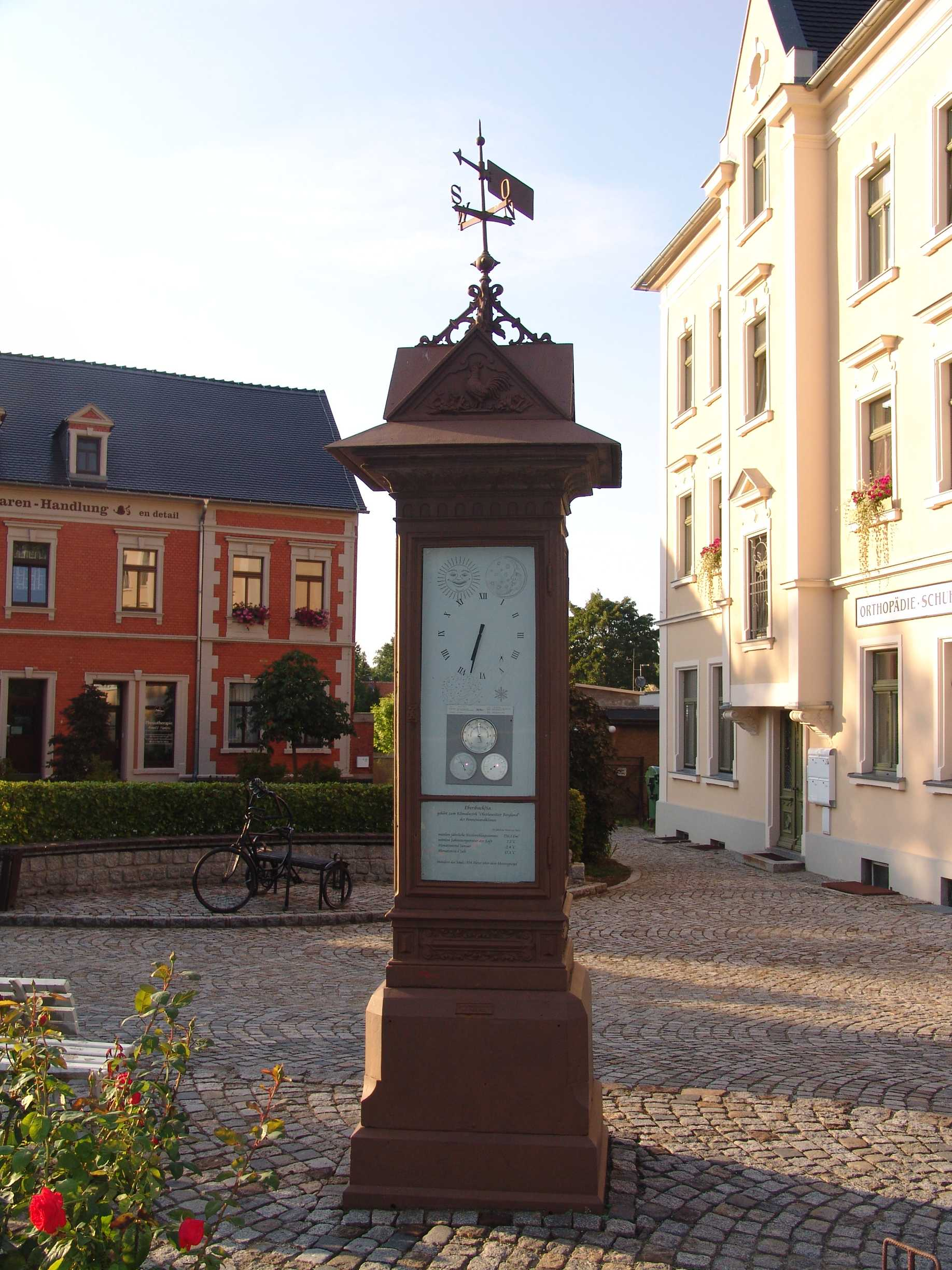 Säule in der Bahnhofstraße in Ebersbach/Sa., Landkreis Görlitz, Sachsen